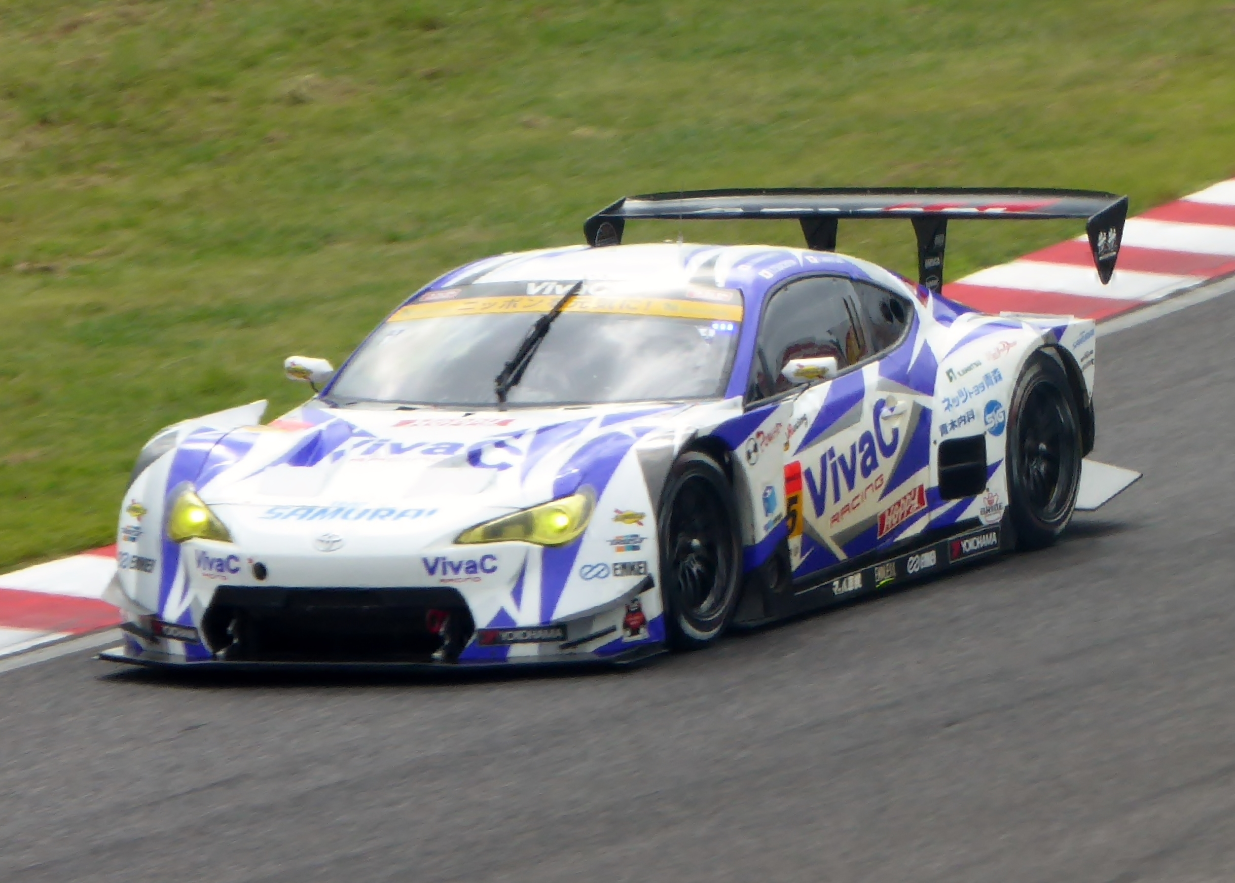 2016年鈴鹿1000㎞における25号車Vivac 86 MCを撮影。